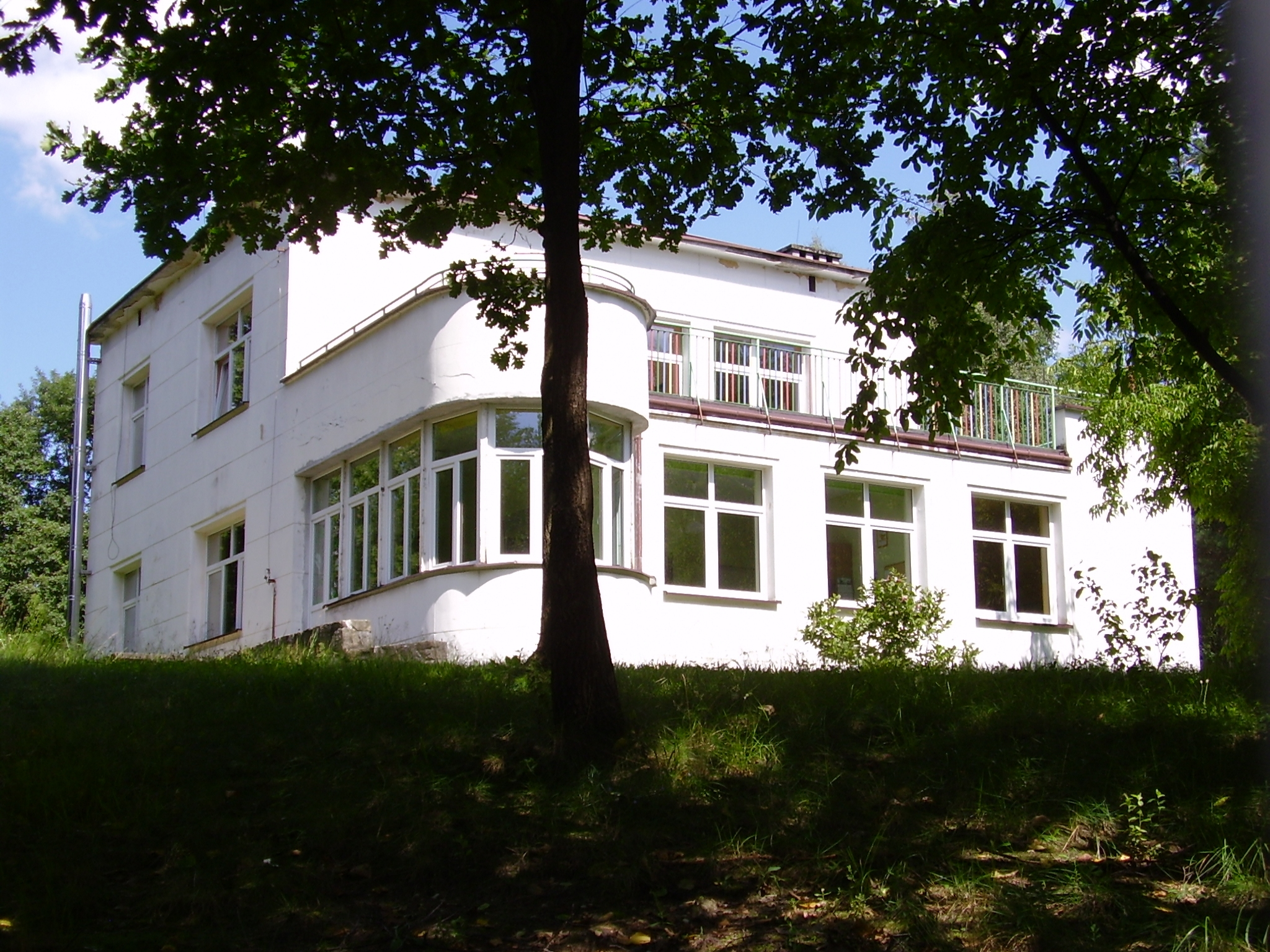 Nowa Dęba, Świetlica szkolna, tzw. Paulusówka, 2011-08-05